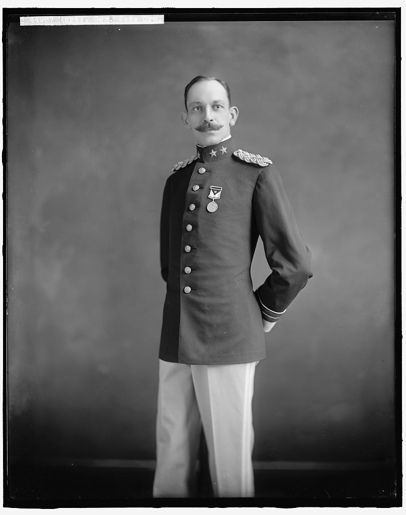 José Francisco Martí y Zayas-Bazán, el Ismaelillo, el hijo de Maerti.